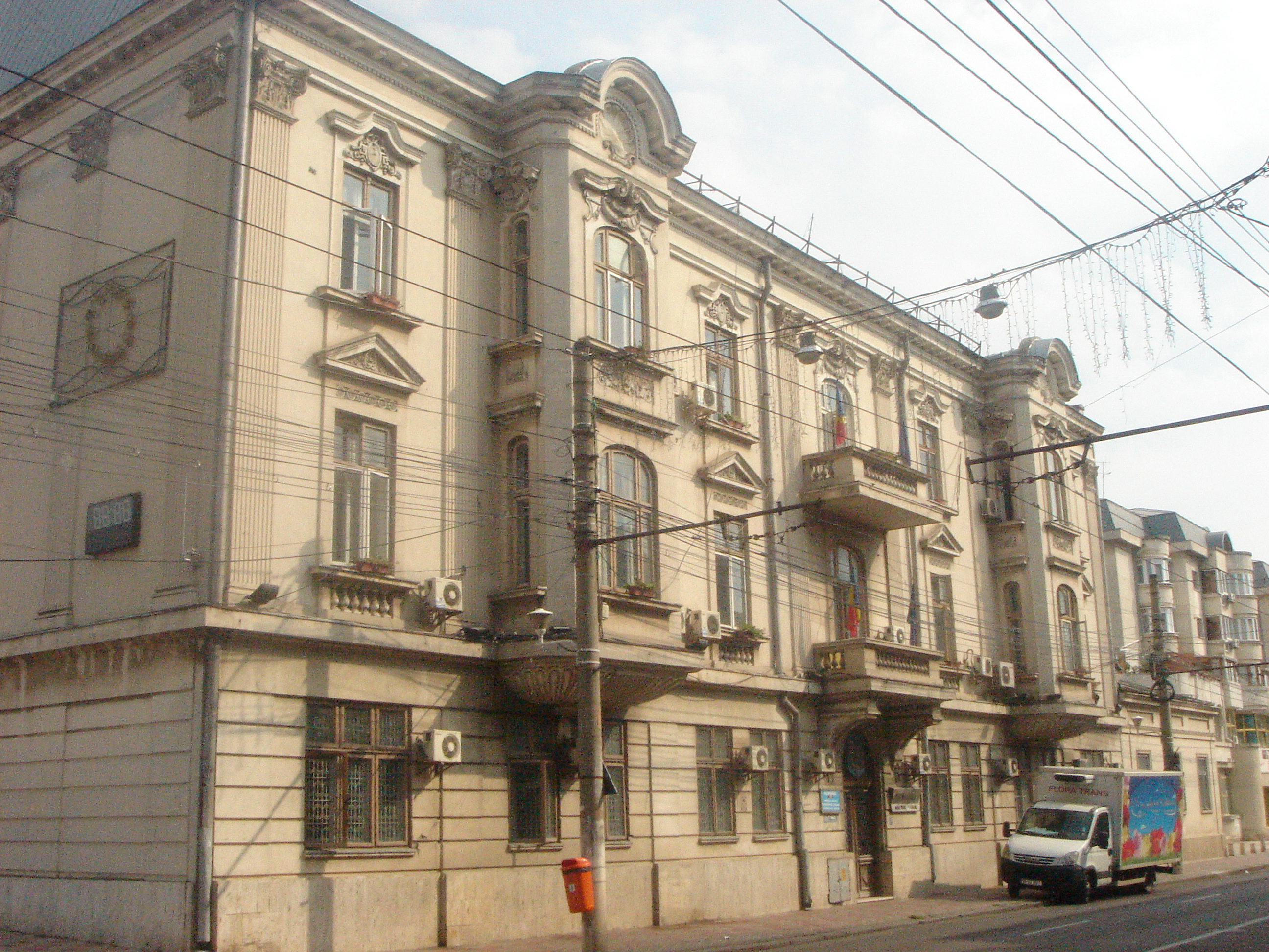 Grand Hotel, azi Primaria Municipiului Galati, se afla pe Strada Domneasca vis-a-vis de Universitatea Dunarea de Jos si de Biserica Vovidenia.